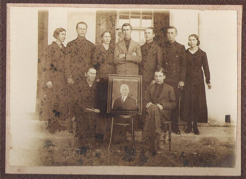 Família de Adolfo Kindermann. Fernando Kindermann está de pé, o segundo a partir da esquerda. Fotografia cedida por Estela Maria Kindermann Bianchini, Braço do Norte/SC. Acervo da família.